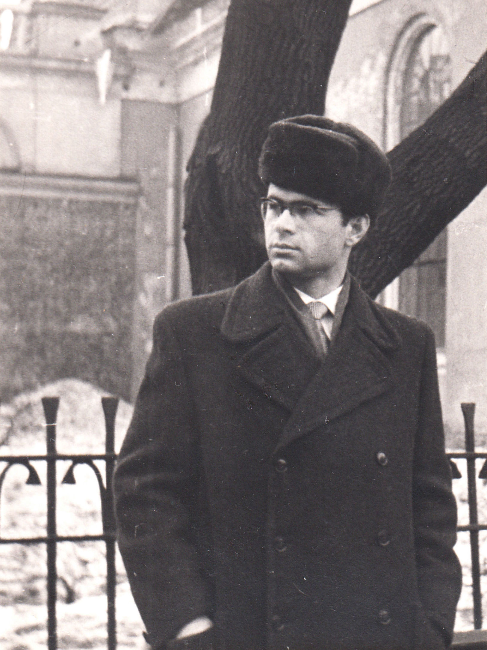 Jaromír Mirovský, Leningrad 1959